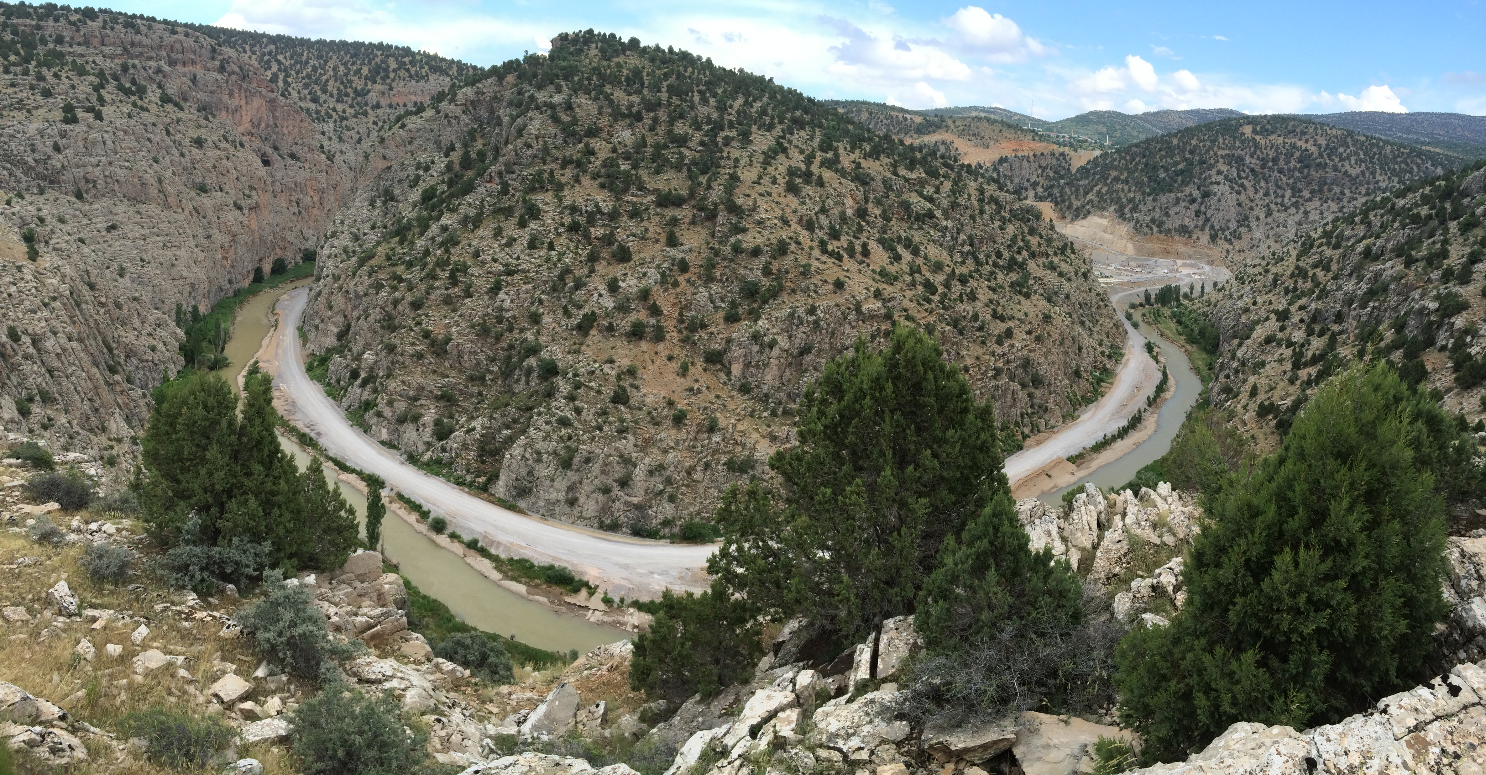 haziran 2015 panoramik